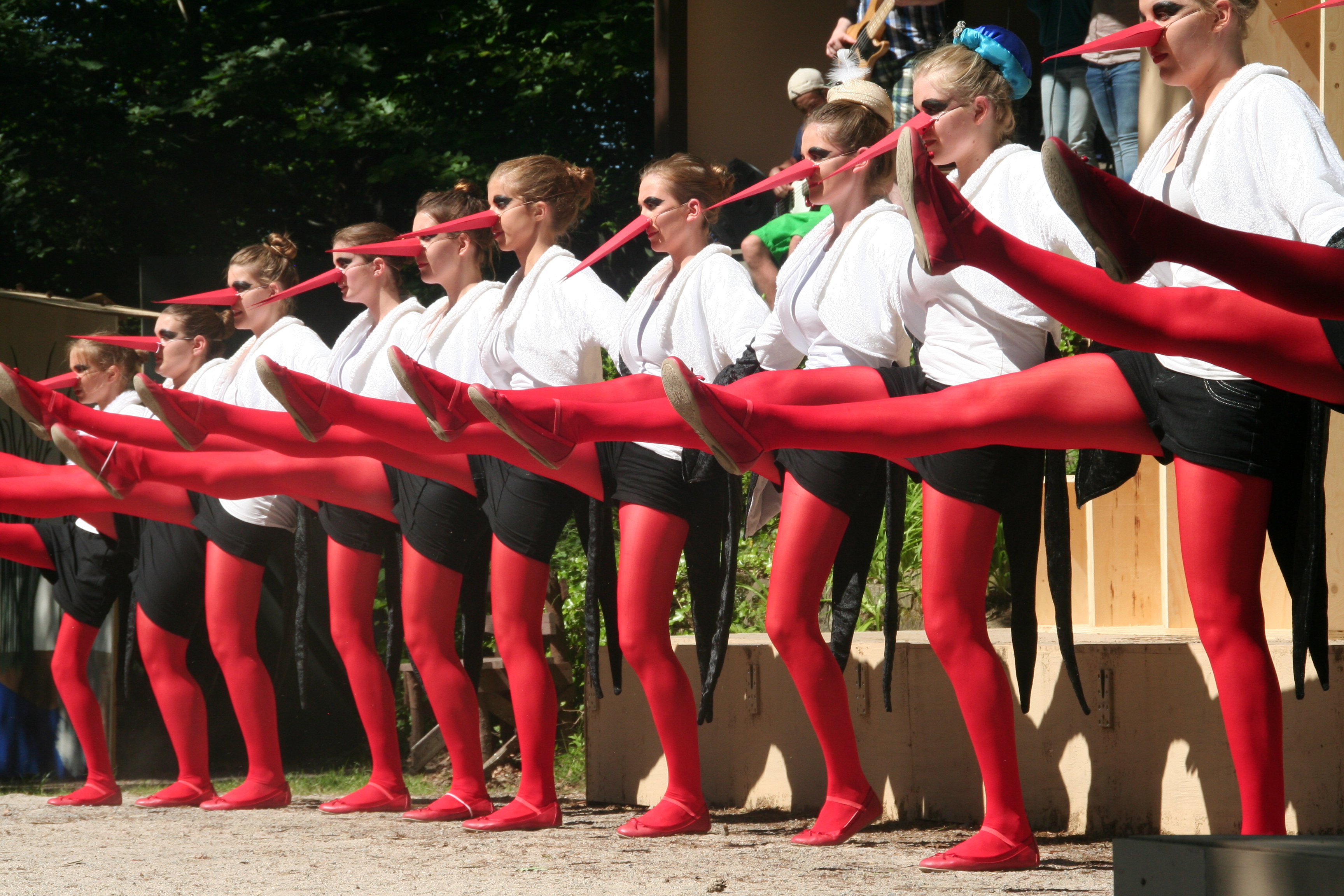 Deitsch: Szene aus Kalif Storch